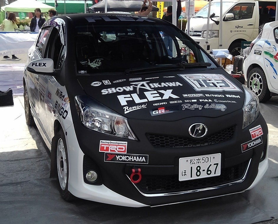 哀川翔がTGRラリーチャレンジでドライブしたトヨタ・ヴィッツ